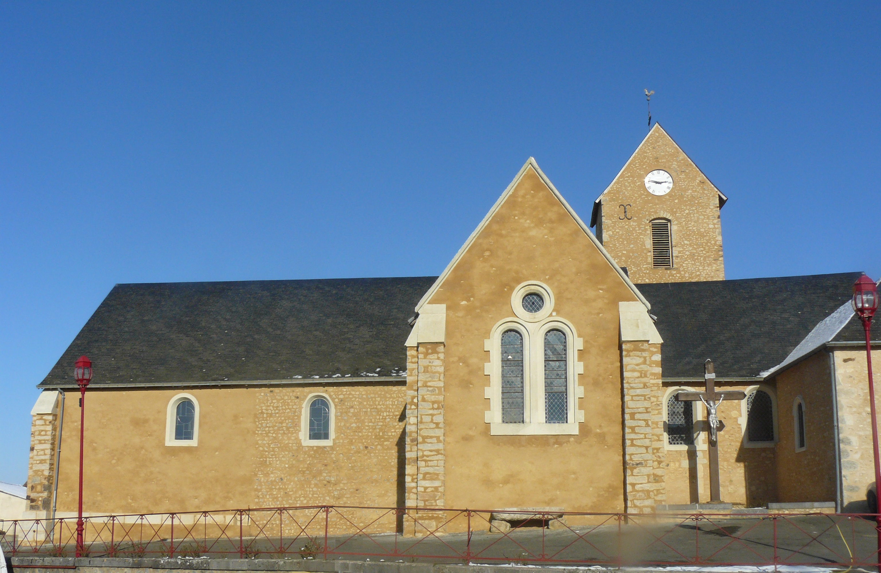 Son origine remonte au 11e siècle. Dans les années 1840-1850, afin de faire face à l'augmentation de la population et du nombre de fidèles, l'église est agrandie par l'adjonction de deux chapelles et de deux nouvelles fenêtres, tandis que la nef est allongée vers l'ouest.